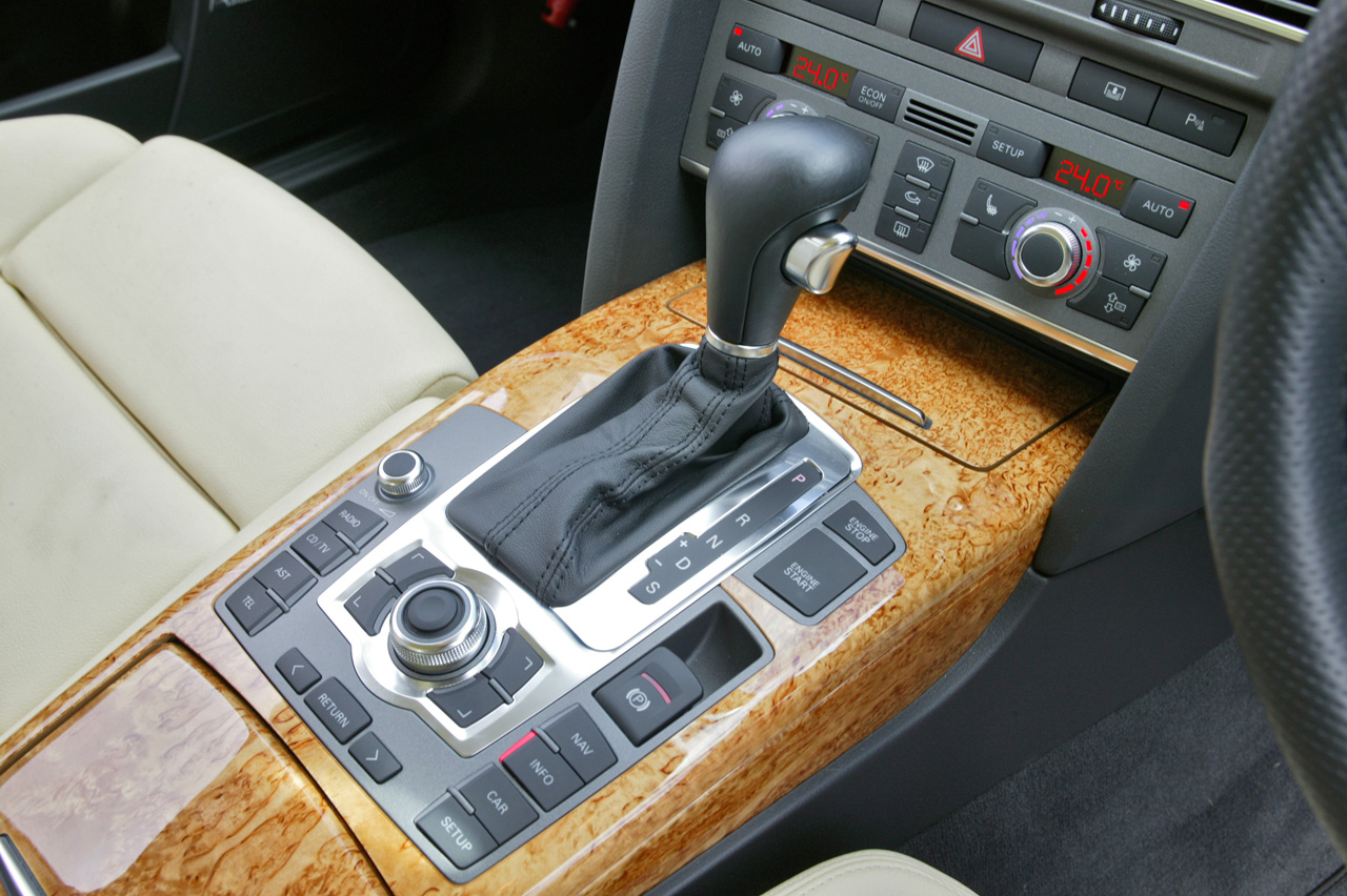 Audi A6 (2005 C6) Multi Media Interface (MMI)